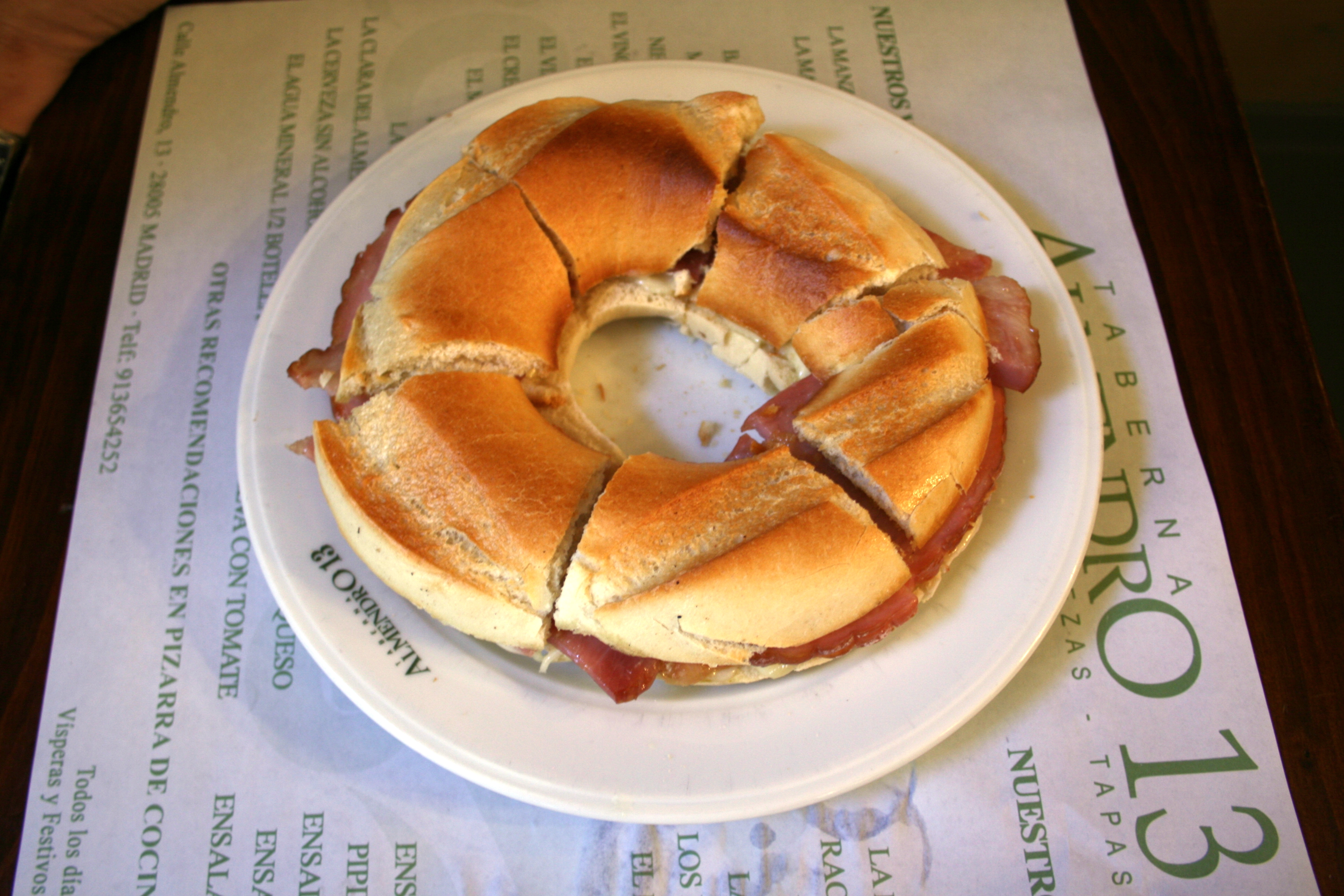 Rosca -Madrid